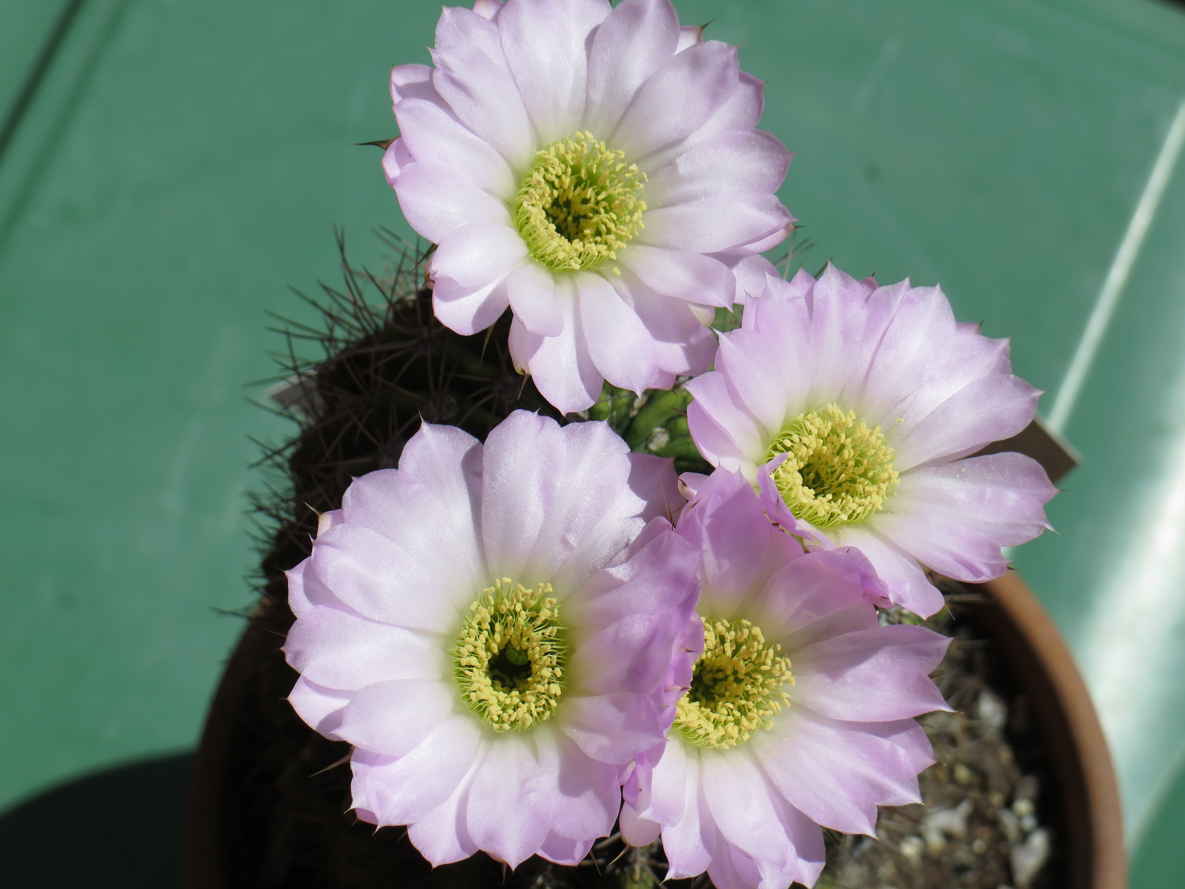 I fiori dell'acanthocalycium spiniflorum